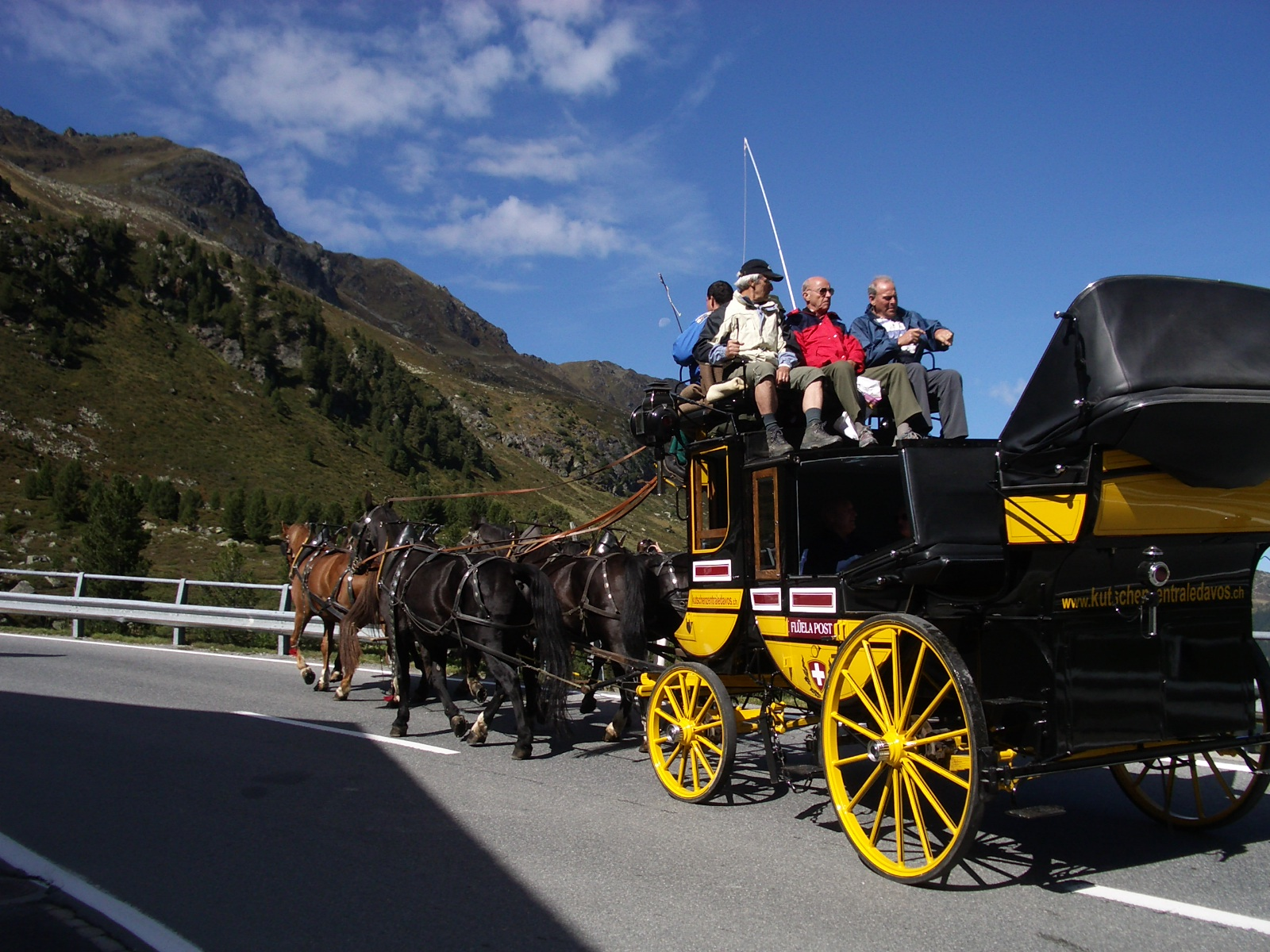 Flüela pass, Switzerland self-made, September 2006